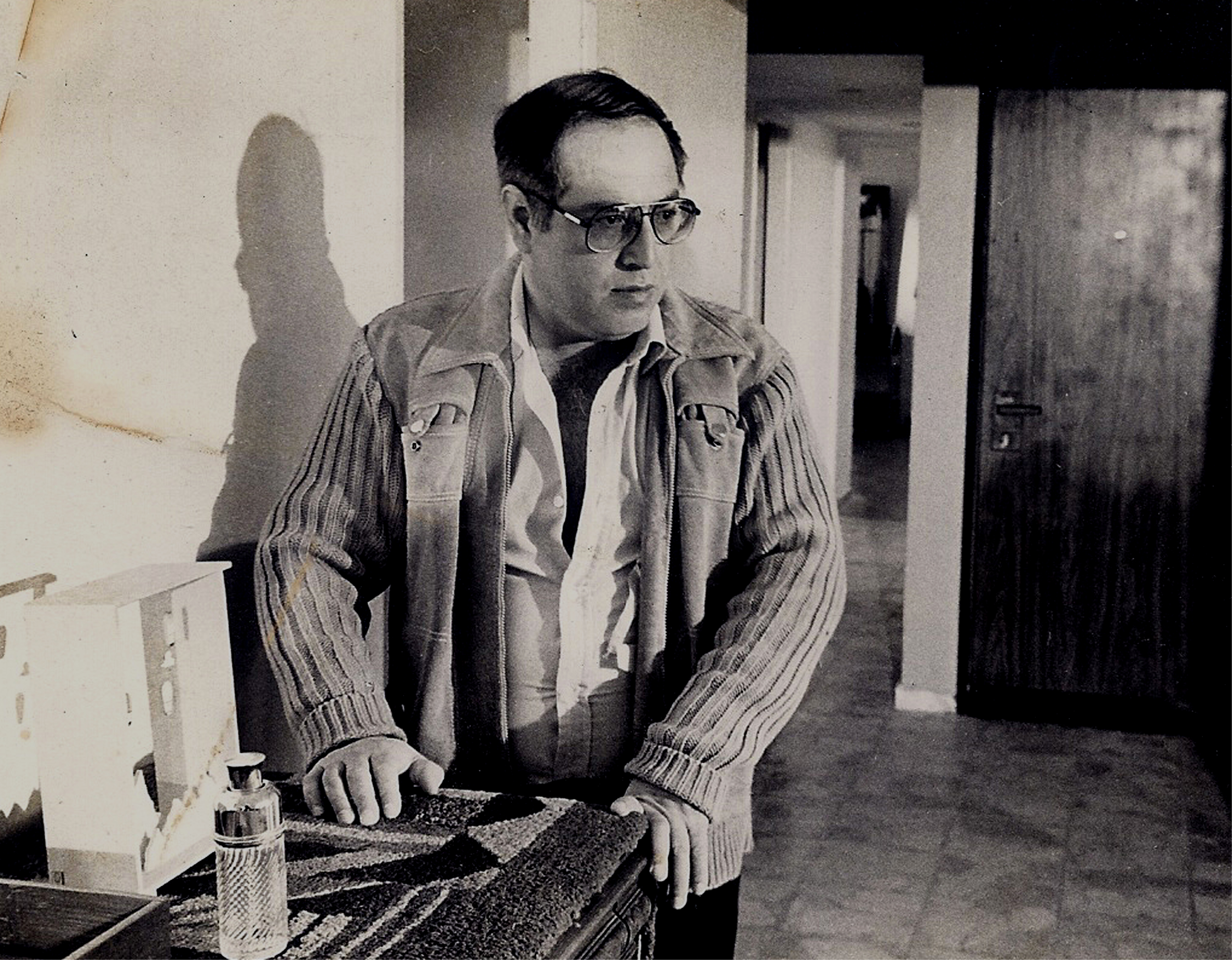 טוביה צפיר ב"הקוקיה" מתוך "סיפורים לשעת לילה מאוחרת"